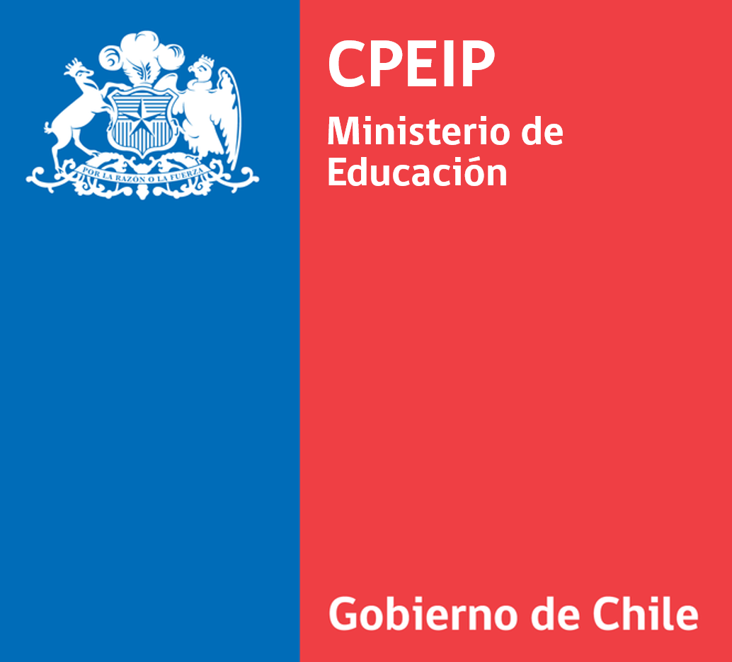 Logo institucional del Centro de Perfeccionamiento, Experimentación e Investigaciones Pedagógicas.